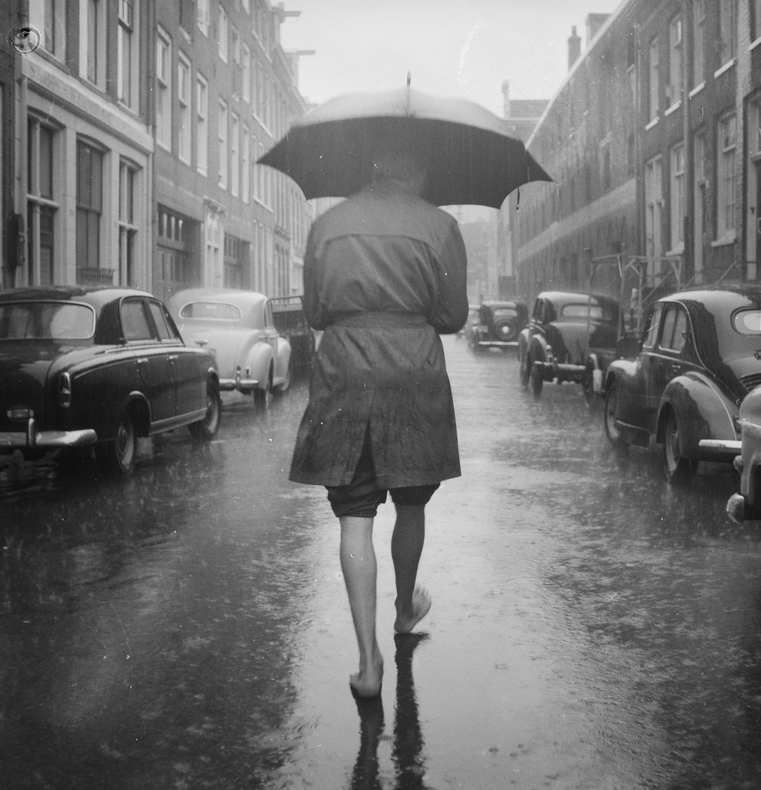 Collectie / Archief : Fotocollectie Anefo Reportage / Serie : [ onbekend ] Beschrijving : Dappere wandelaar in wolkbreuk boven Amsterdam Datum : 12 augustus 1960 Locatie : Amsterdam, Noord-Holland Trefwoorden : paraplu's, wandelaars, weer Fotograaf : Lindeboom, Henk / Anefo Auteursrechthebbende : Nationaal Archief Materiaalsoort : Negatief (zwart/wit) Nummer archiefinventaris : bekijk toegang 2.24.01.03 Bestanddeelnummer : 911-4967